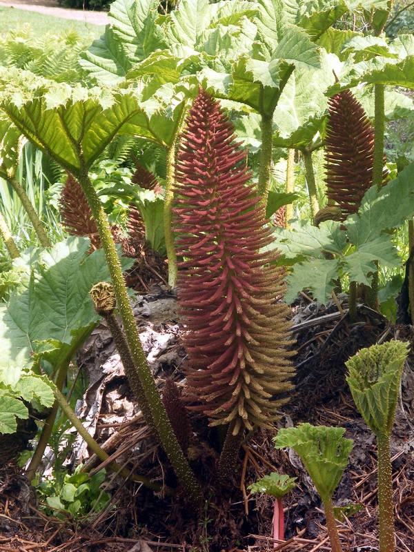 Gunnera manicata